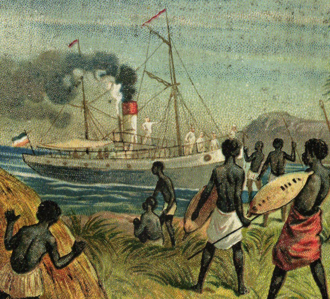 Dampfer Hermann von Wissmann, Ausschnitt aus einem Reklamesammelbild